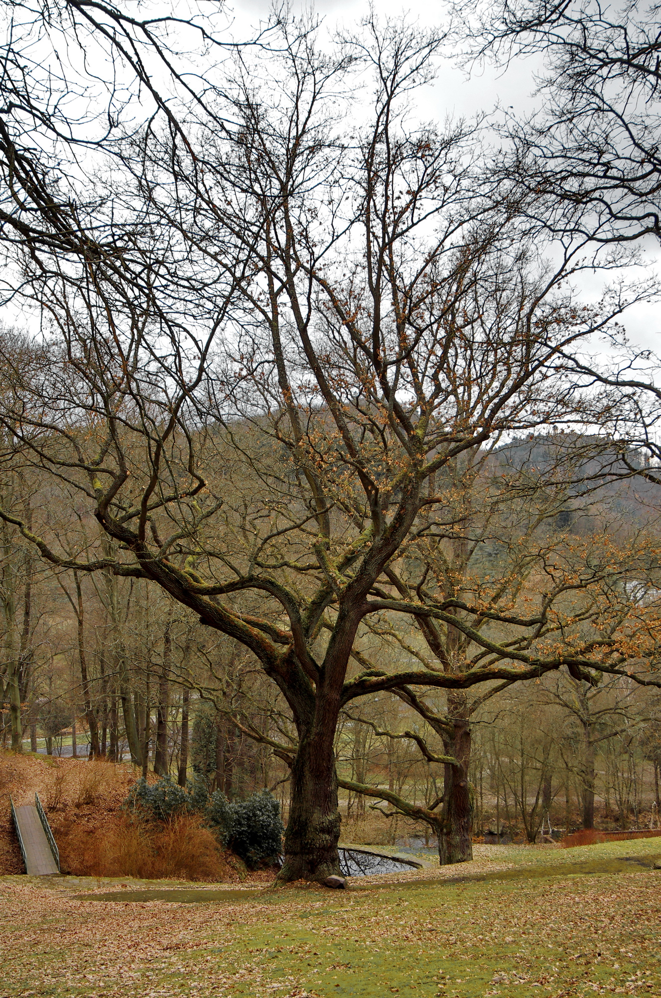 Památné stromy Duby u Richmondu, Karlovy Vary